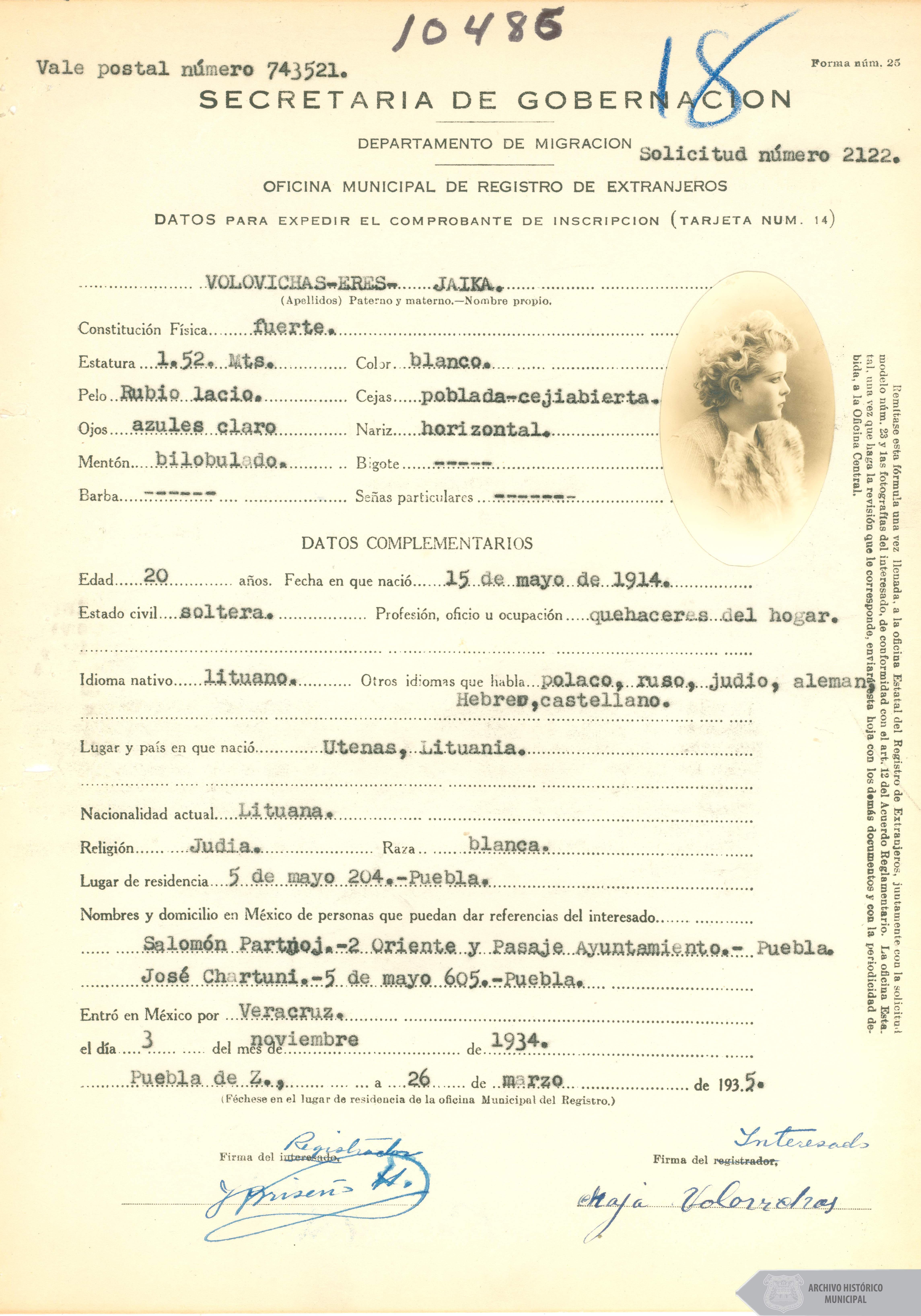 Hoja de registro de ingreso de inmigrantes judios a Puebla - Expediente 9321